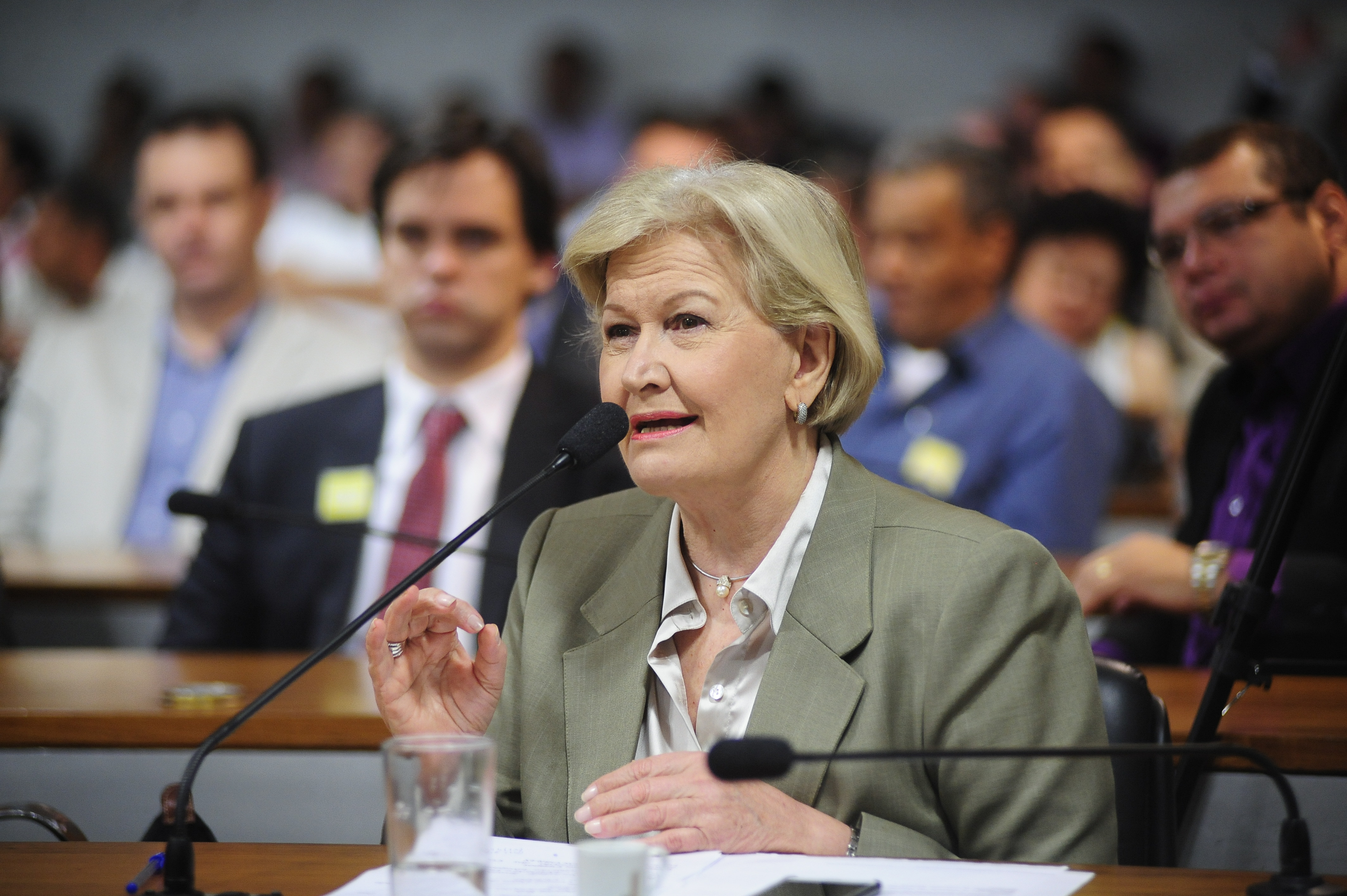 Comissão de Direitos Humanos e Legislação Participativa (CDH) realiza audiência pública interativa para debater sobre: "Os Objetivos do Movimento Nacional Pro Associativismo." À bancada, senadora Ana Amélia (PP-RS). Foto: Pedro França/Agência Senado